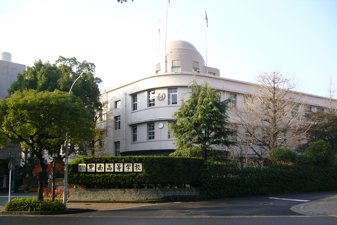 鹿児島県立甲南高等学校正門